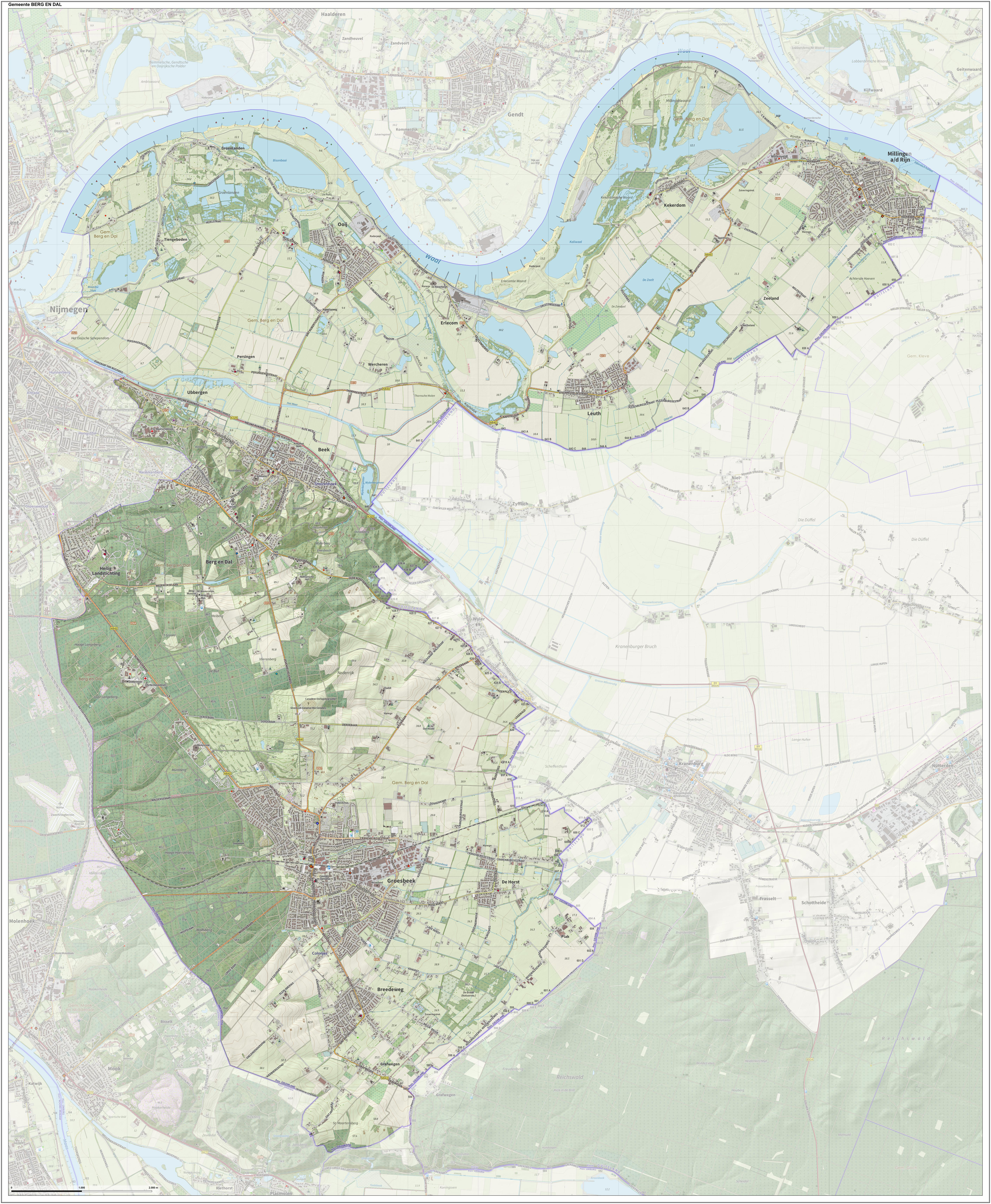 Topografische kaart van gemeente Berg en Dal. Samengesteld door Jan-Willem van Aalst op basis van de GML open geodata van de BRT/Top10NL (basisregistratie Topografie, Kadaster), vrijgegeven door Kadaster onder de Creative Commons BY licentie. Additionele gegevens uit BAG uit de Open Street Map en uit de Risicokaart. Zie ook de Legenda.